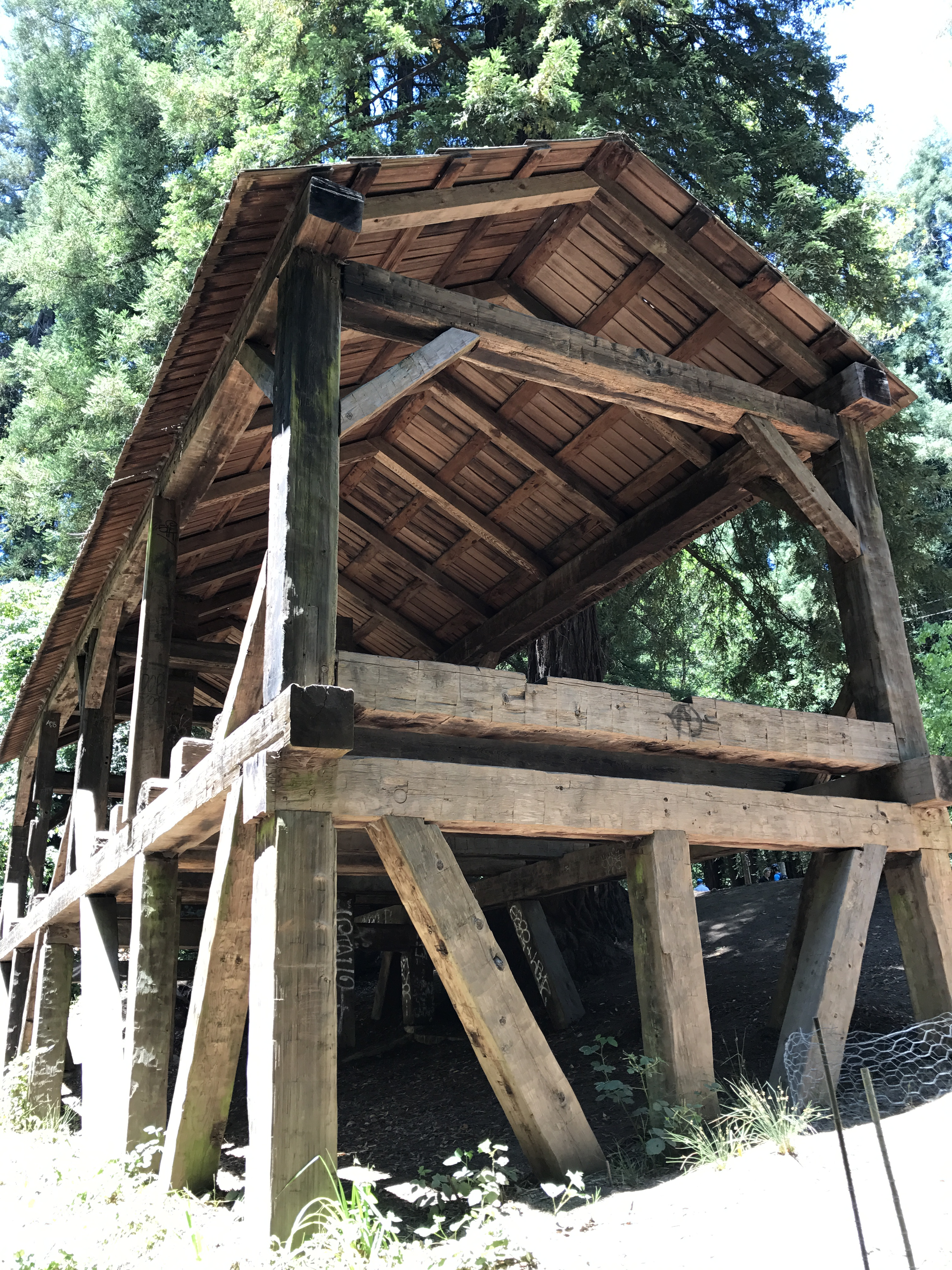 mill valley old mill